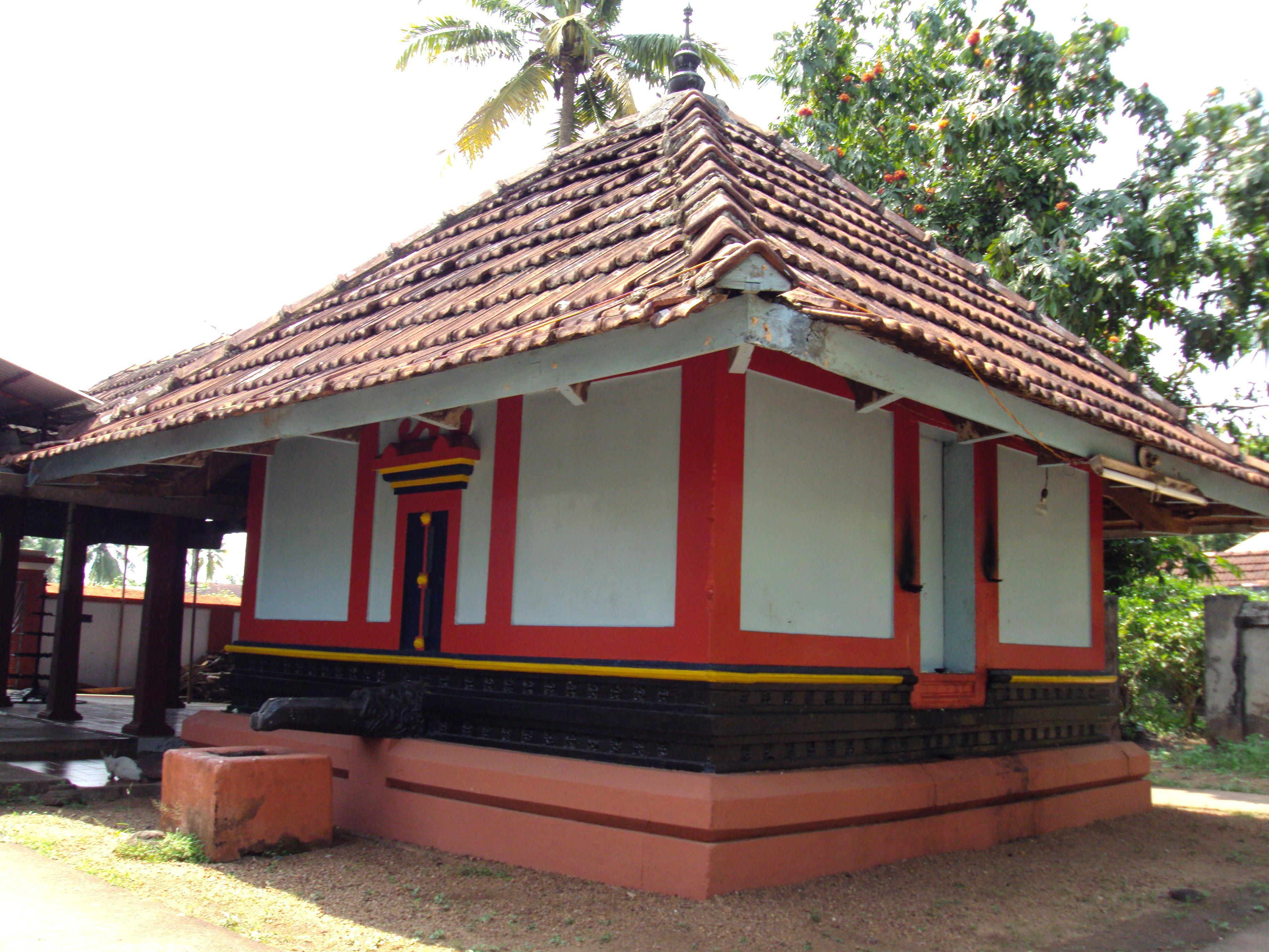 കീഴ്തൃക്കോവിൽ